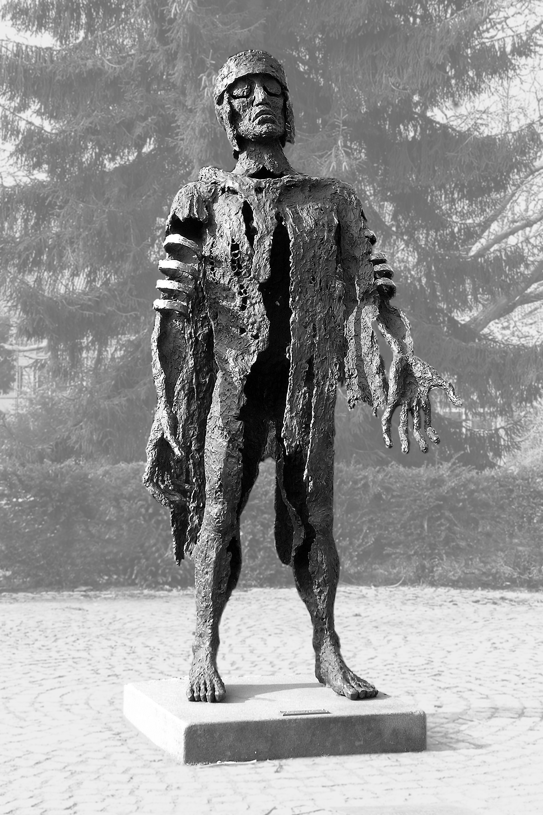 Varus Bronzeskulptur von Winfried Koch